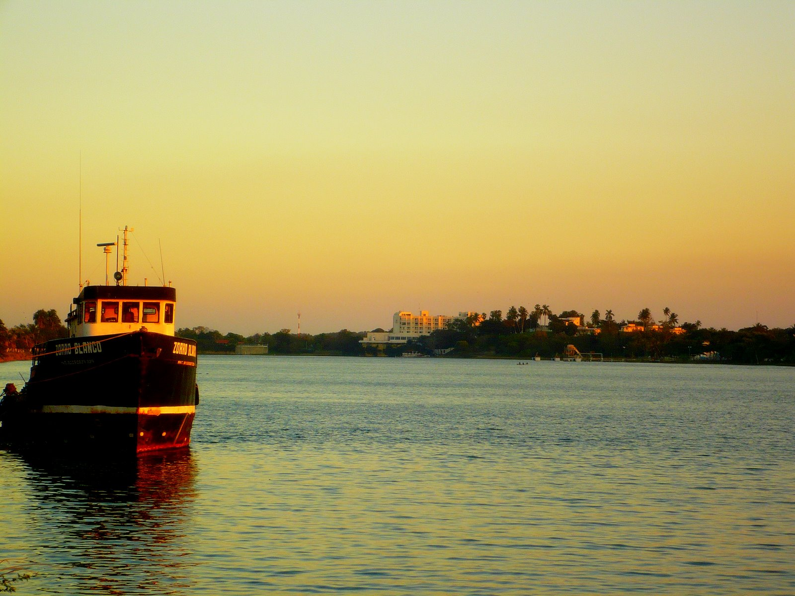 Barco llamado "Zorro Blanco"